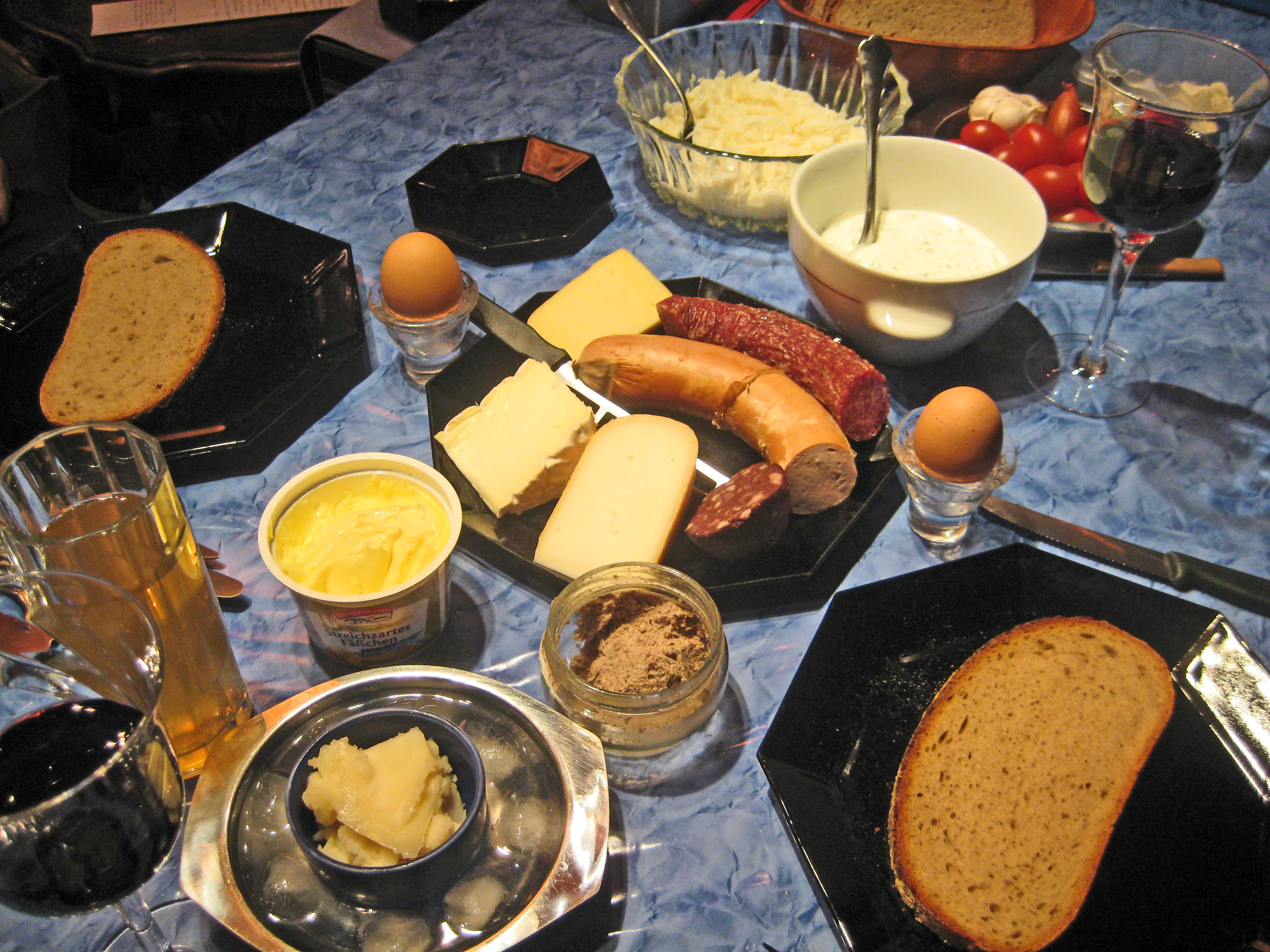 Mit Rotwein, Apfelwein, Gänsefett, Butter, Leberwurst, Roggenbrot, Wurst & Käse, gekochte Eier, Käsmatte (Kräuterquark), Rettichsalat, Tomaten, Knoblauch, Zwiebeln}. It is our so called 'Ahmbrot' (= special evening meal with rye bread). - Our Ahmbrot recipe (in German) you can find here